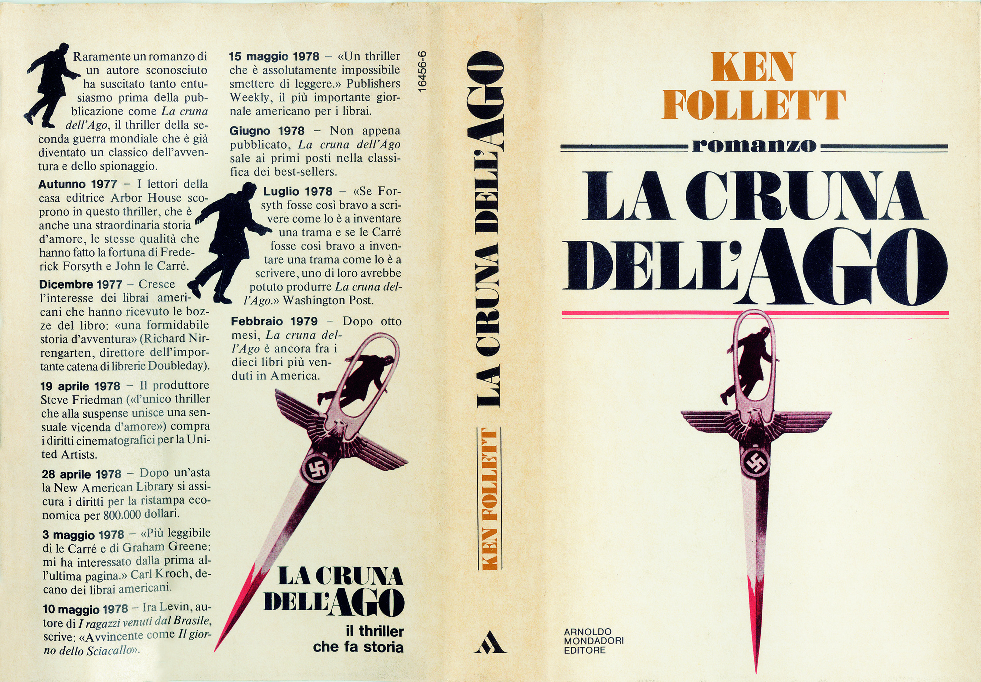 Copertina dell'edizione italiana romanzo La cruna dell'ago, thriller di Ken Follett, pubblicato da Mondadori nel 1979.